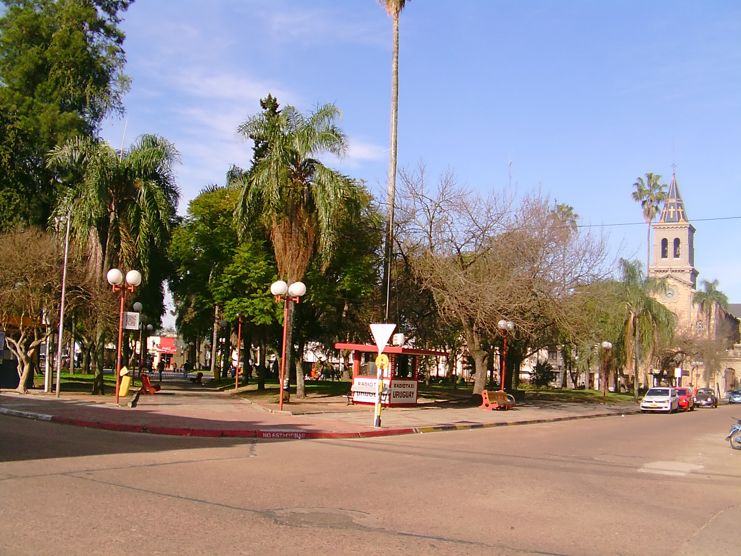 Plaza 19 de Abril Tacuarembó